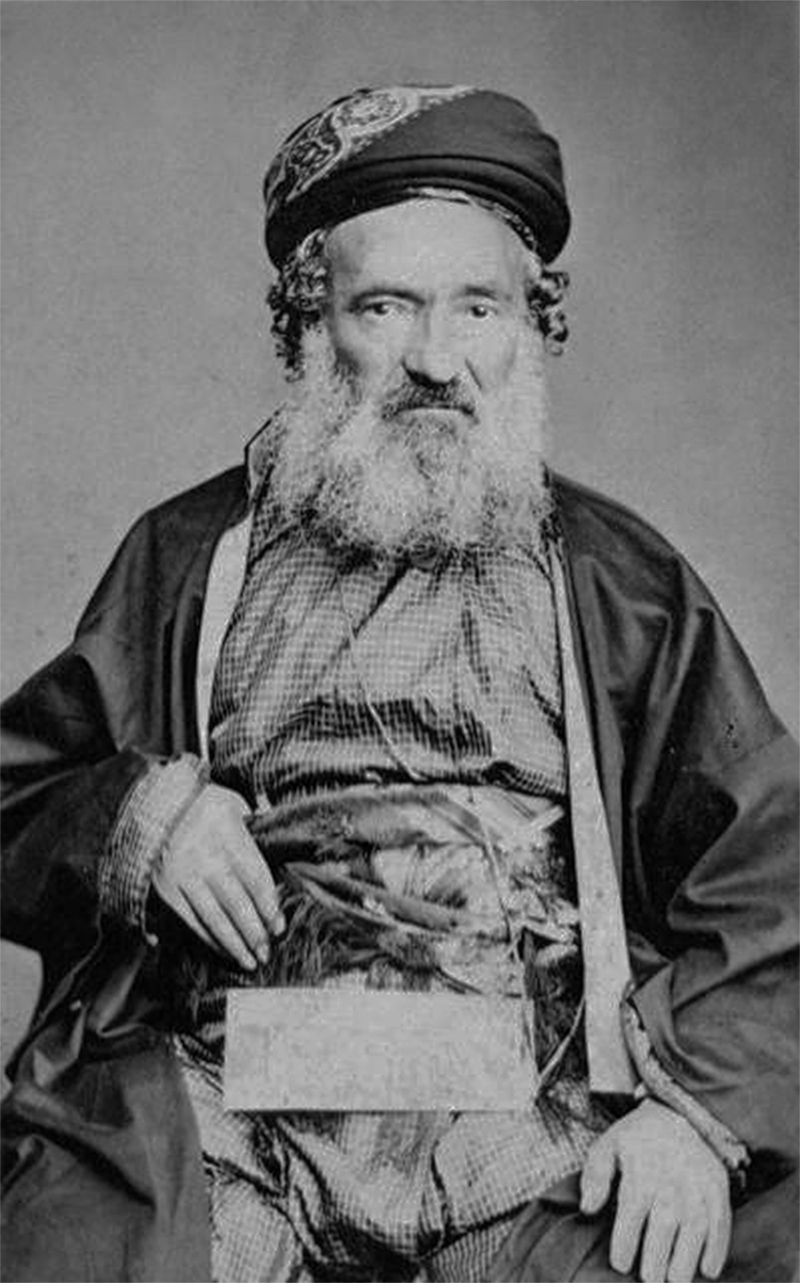 הרב יעקב ספיר רישיון נוצר על ידי he:משתמש:Mort